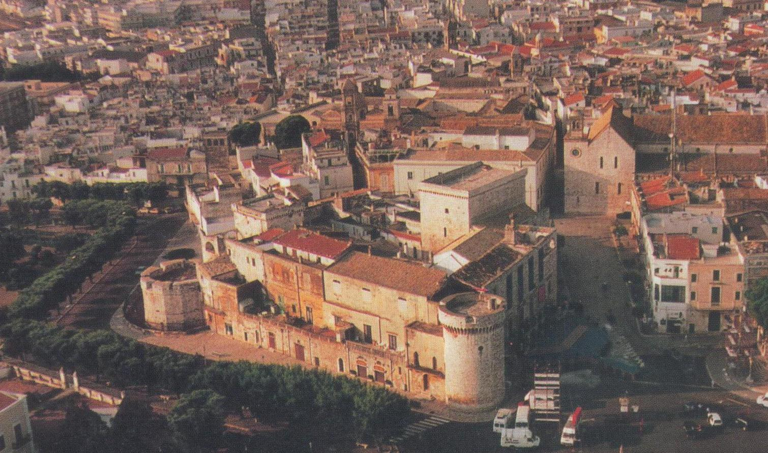 Conversano, Castello (foto aerea di Francesco Totaro, 1992)